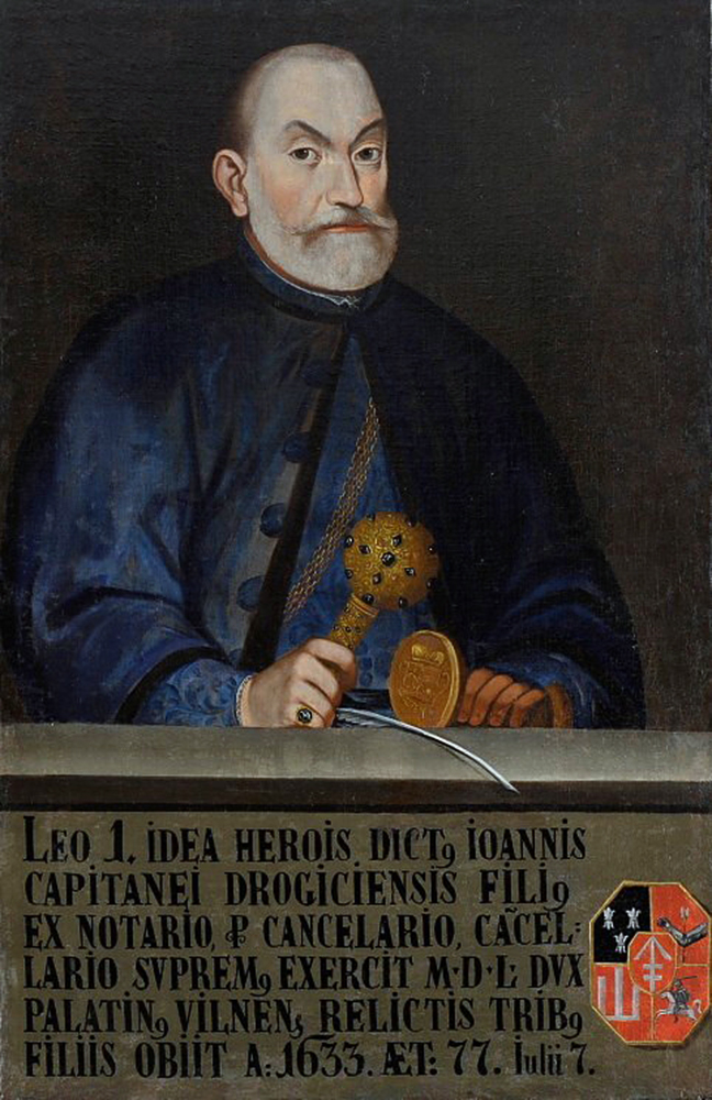 Беларуская (тарашкевіца): Партрэт Льва Сапегі (Leŭ Sapieha)